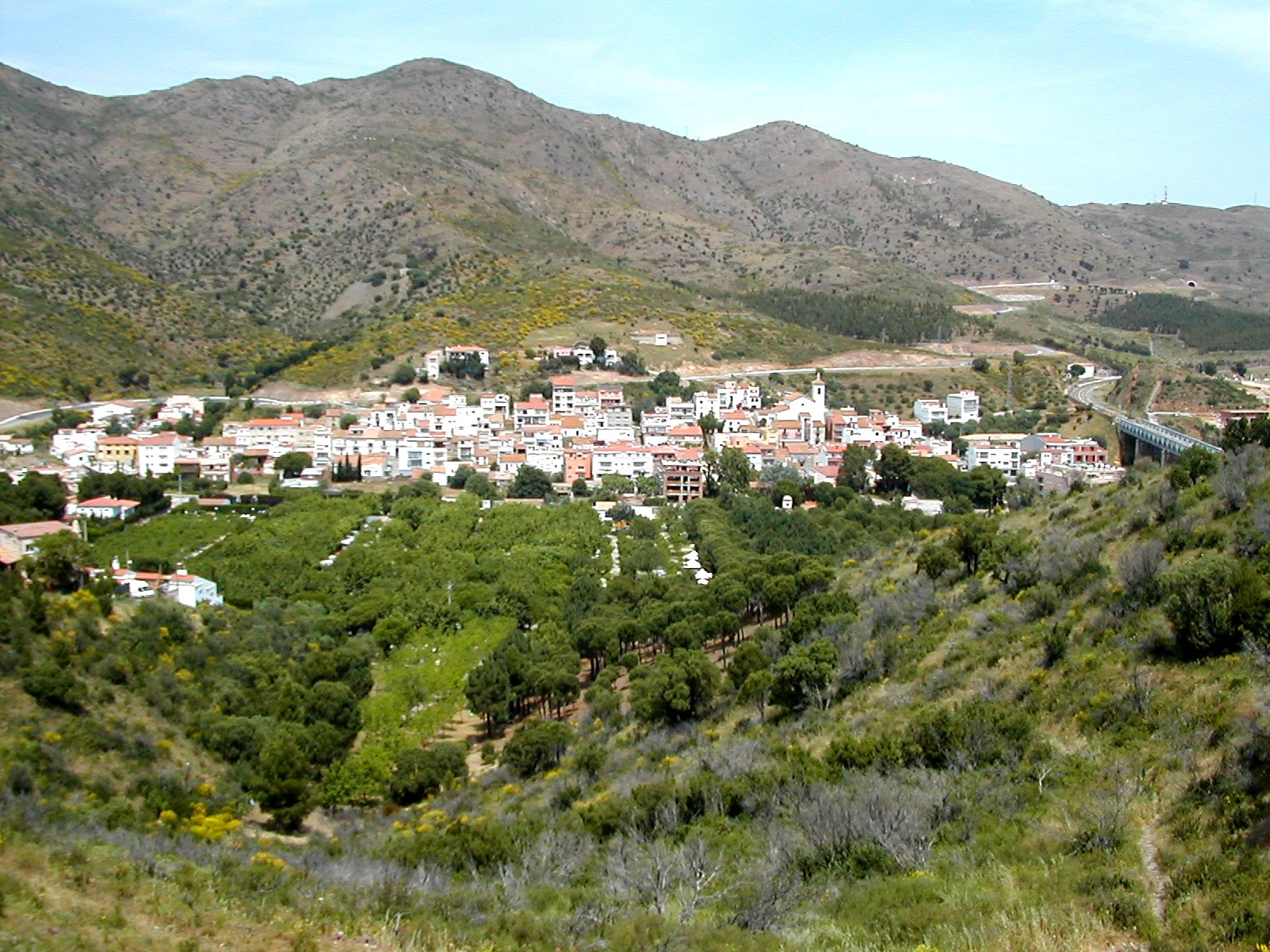 Colera village, Catalonia